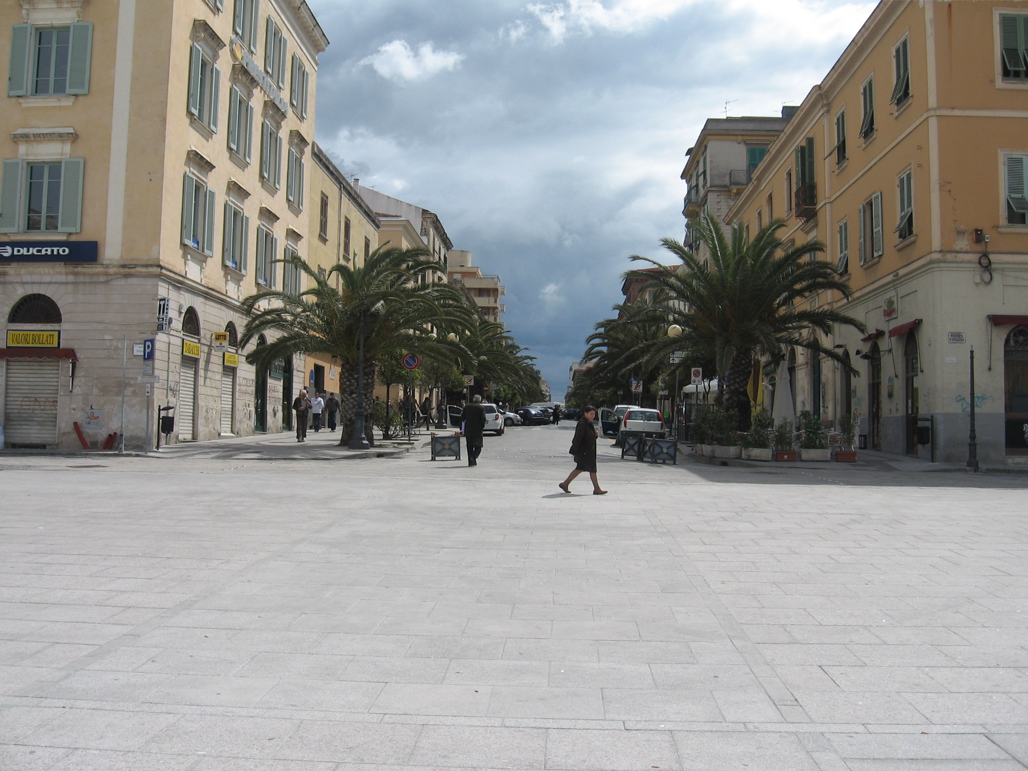 Sassari_via_roma.jpg